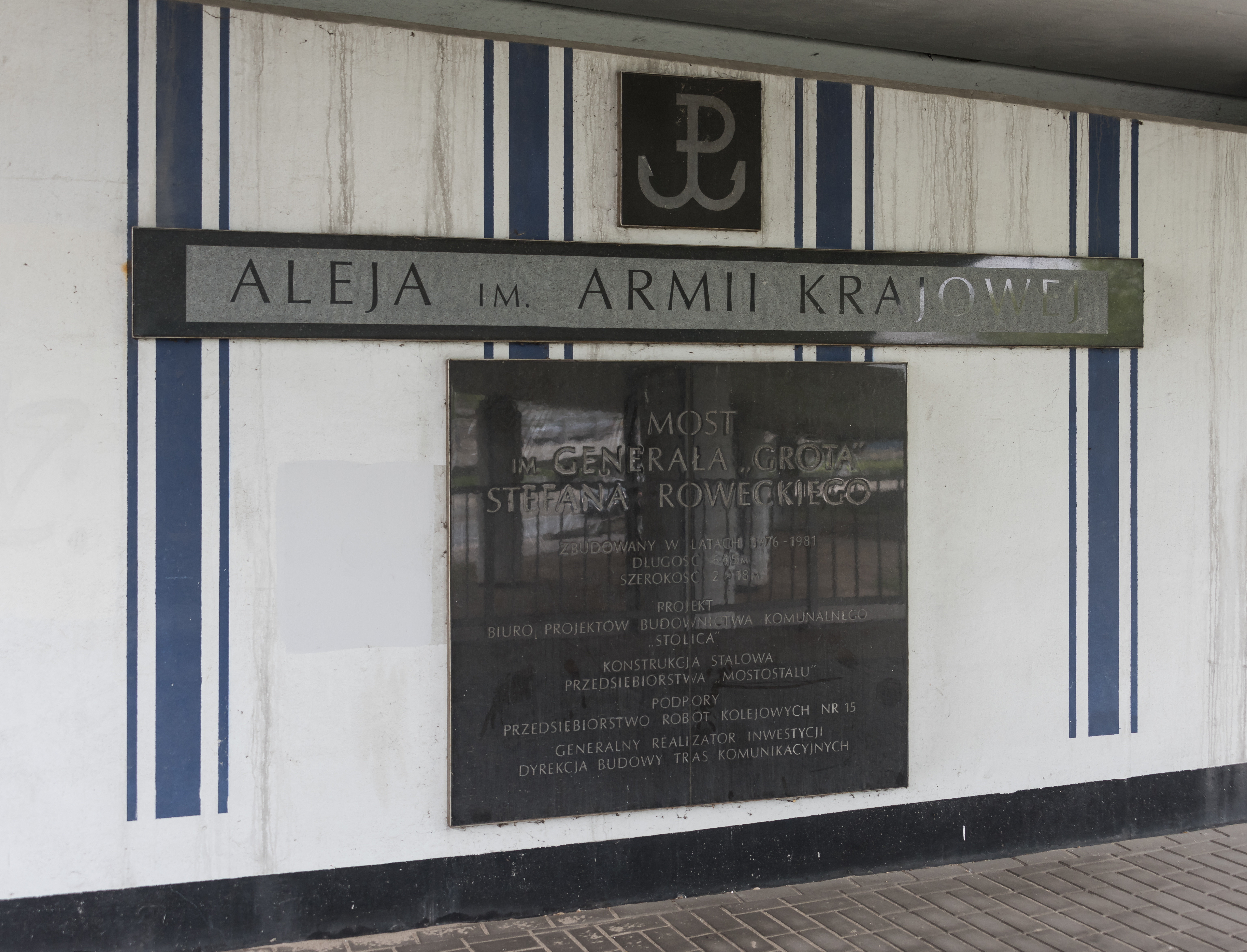 Tablica pamiątkowa na moście most gen. Stefana Grota-Roweckiego w Warszawie